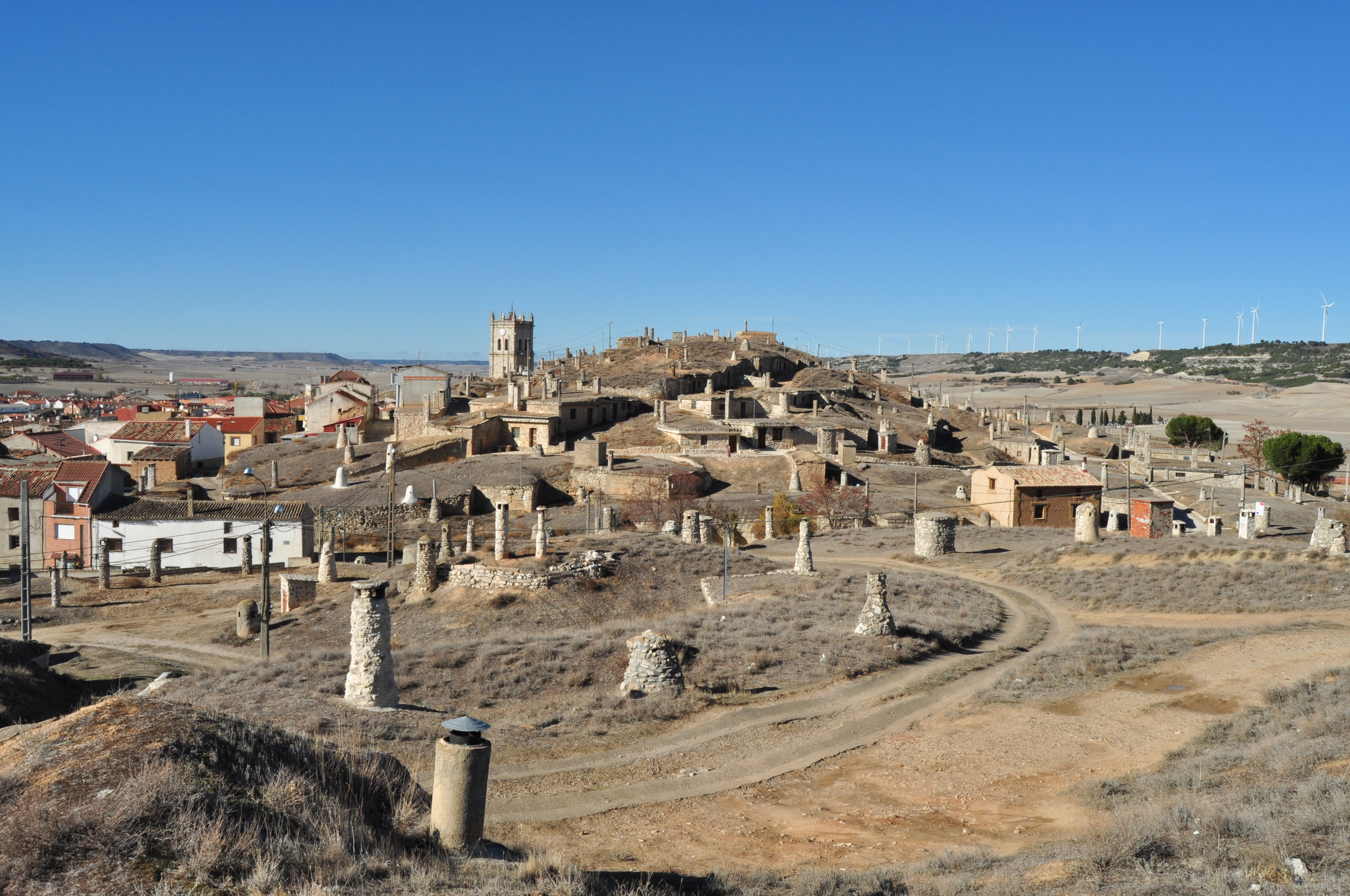 Baltanas - 006